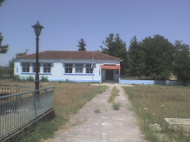 Διθέσιο_Δημοτικό_σχολείο_Νέου_Κεραμιδίου_Κατερίνης